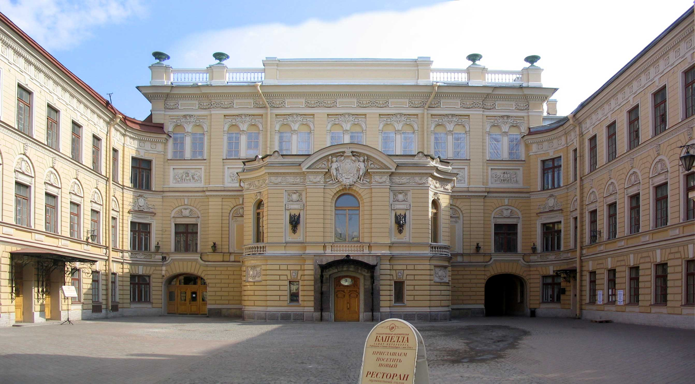 Здание Государственной академической капеллы С.-Петербурга